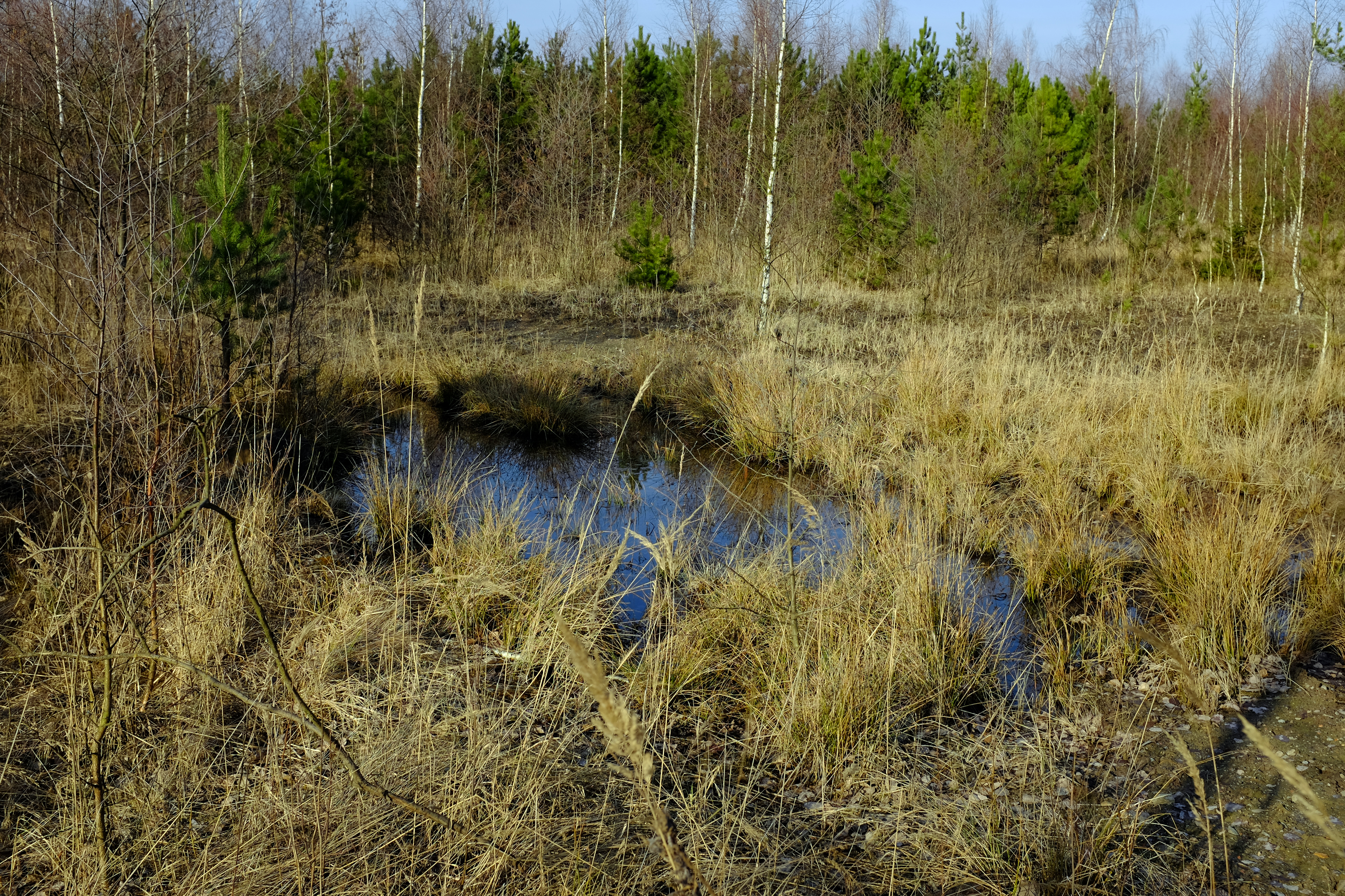 Lítovská výsypka, vrcholová partie, okres Sokolov